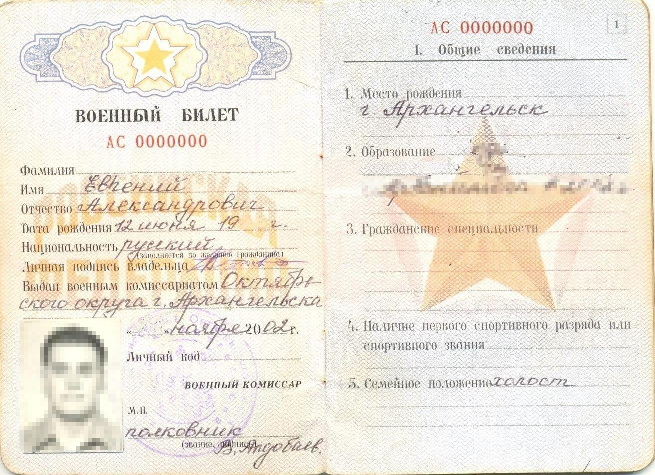 Главный разворот военного билета, выданного в 2002 году